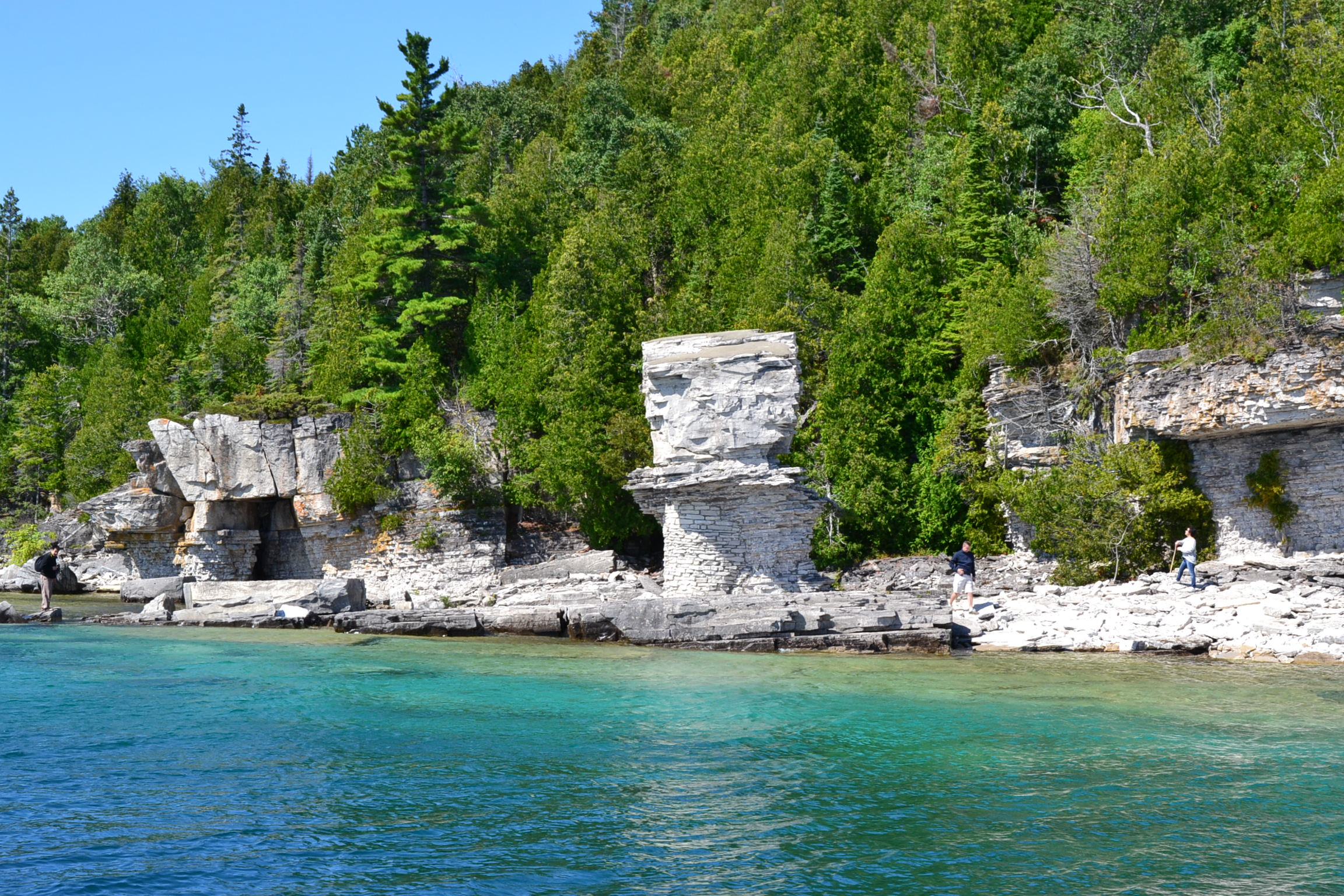 Flowerpot Island - brzeg wyspy od strony jeziora